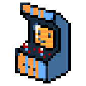 Borne d'arcade réalisée en pixel art (« Crée le 09 mars 2011 » précise un ajout non authentifié, qui confirmerait le style néo-pixel art déjà indiqué dans la légende de l'article Wikipédia)